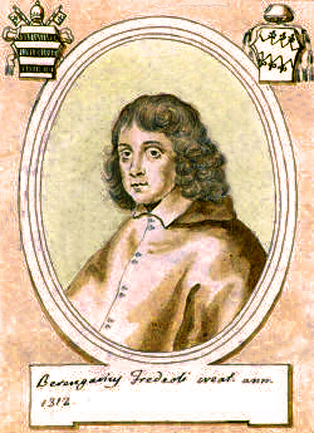 Cardinal Béranger Frédol le Jeune